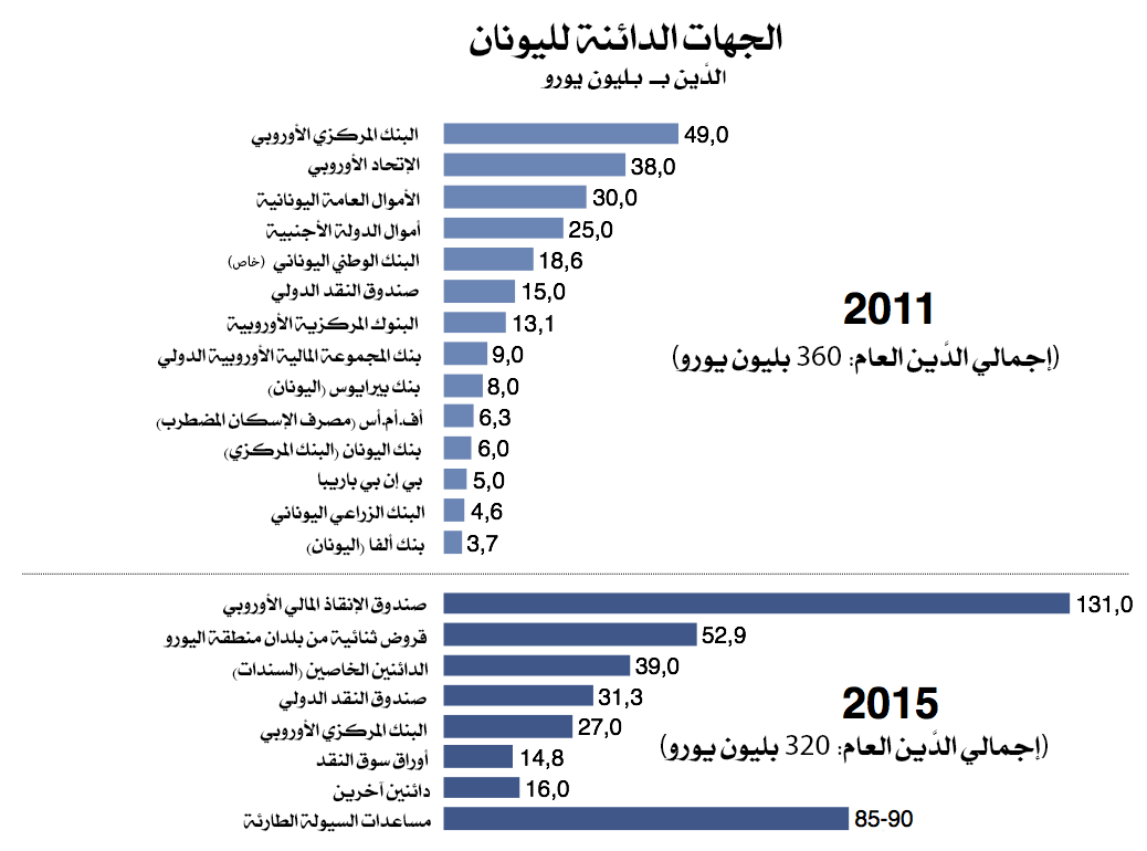 Creditors of Greece 2011 and 2015 Data